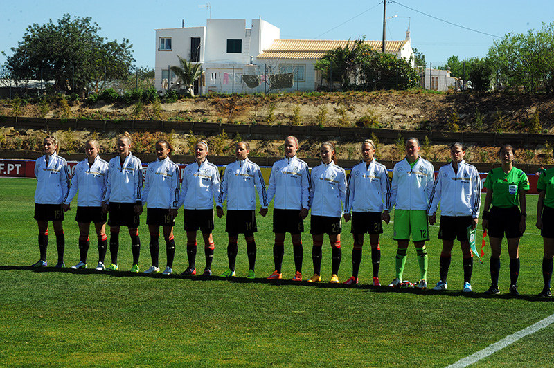 a_42_7326